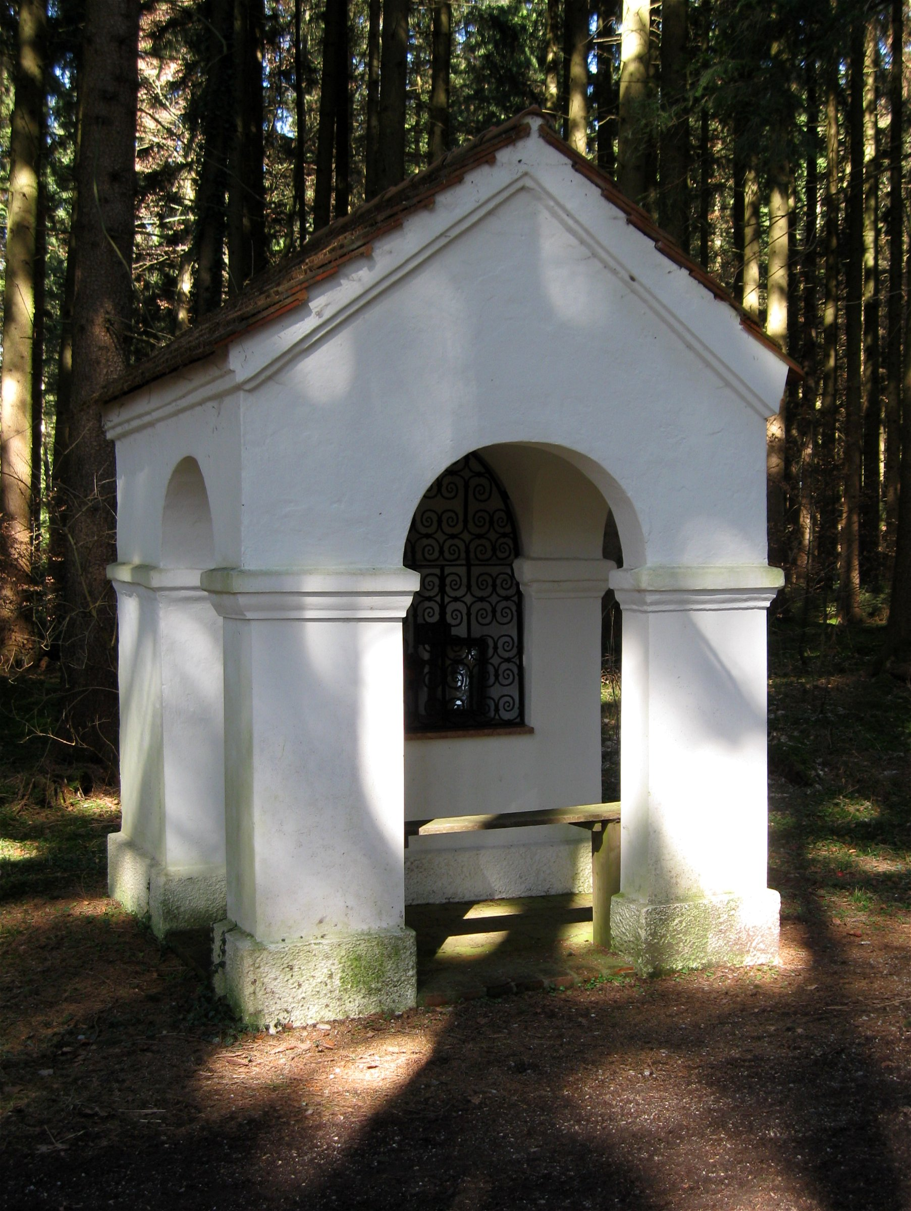 Oberhaching; bei Jettenhausen; Wegkapelle; 2. Hälfte 18. Jh